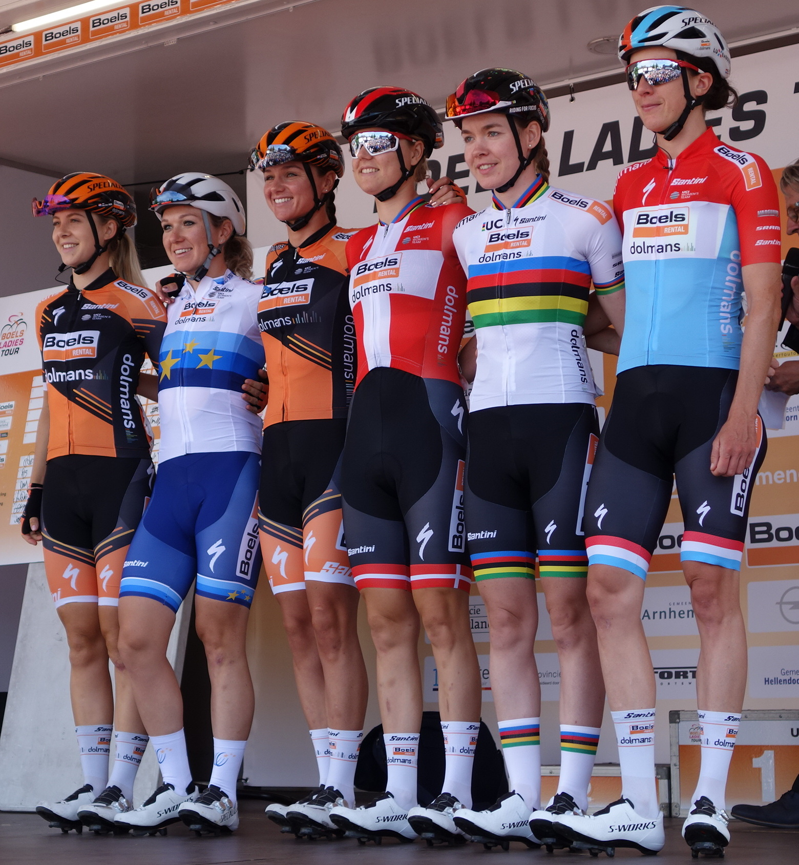 Boels Dolmans bij de start van de eerste etappe van Stramproy naar Weert in de Boels Ladies Tour 2019